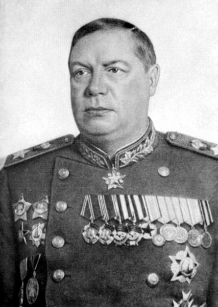 Фёдор Иванович Толбухин (1894 — 1949) — советский военачальник